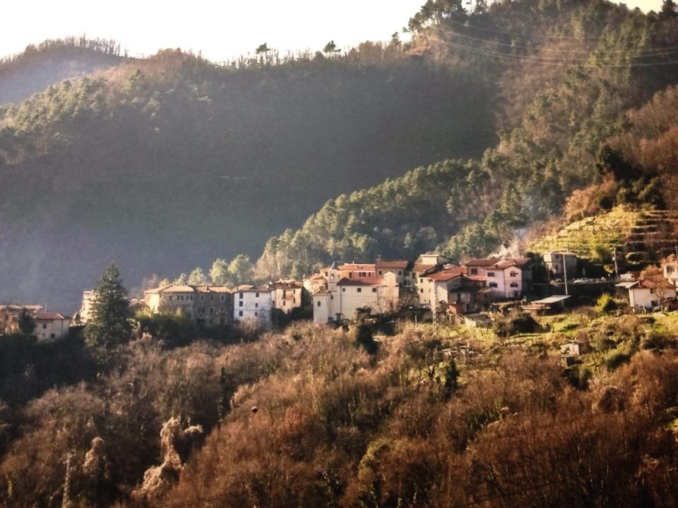 view panorama amazing